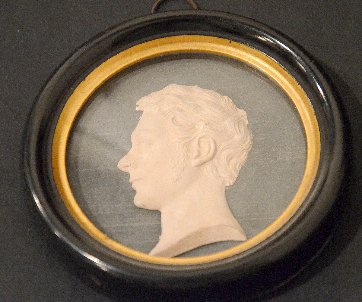 Portraitmedaillon mit dem Bildnis des Oberbergkommissärs und Hofapothekers zu Hannover, Friedrich Wilhelm Brande (1793-1838) ...